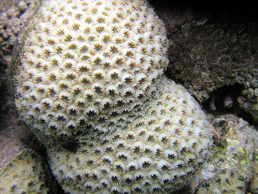 Montastraea curta en Samoa Americana